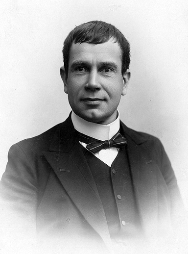 portrett, mann, tannlege, skuespiller, brystbilde.